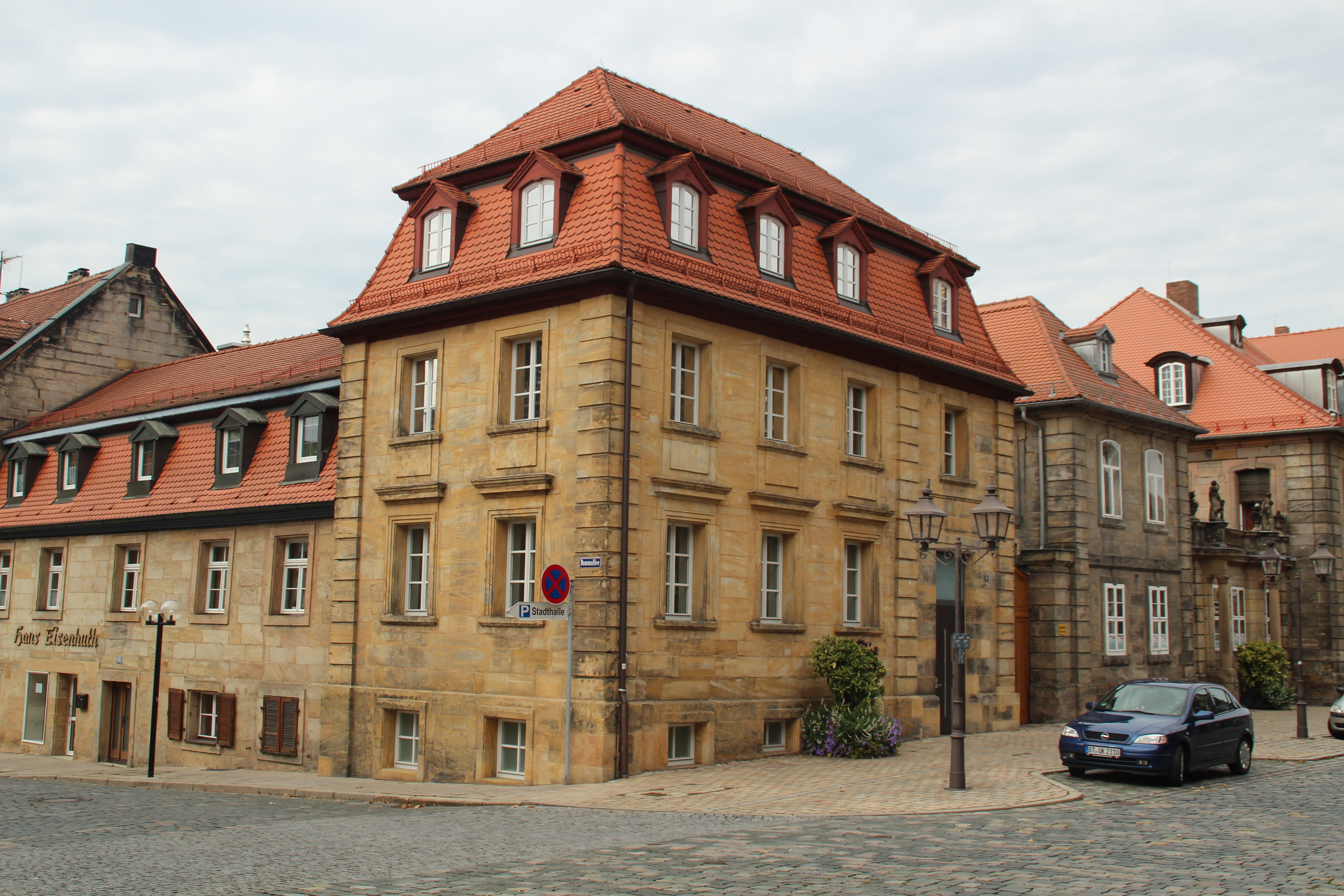 Oberfrankenstiftung Bayreuth, Friedrichstr. 4